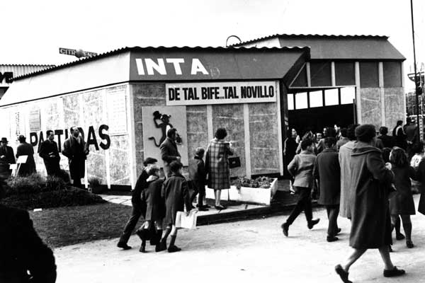 INTA History